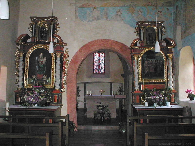 Blick zum Chor der St.-Mauritius-Kirche in Osterburken-Hemsbach